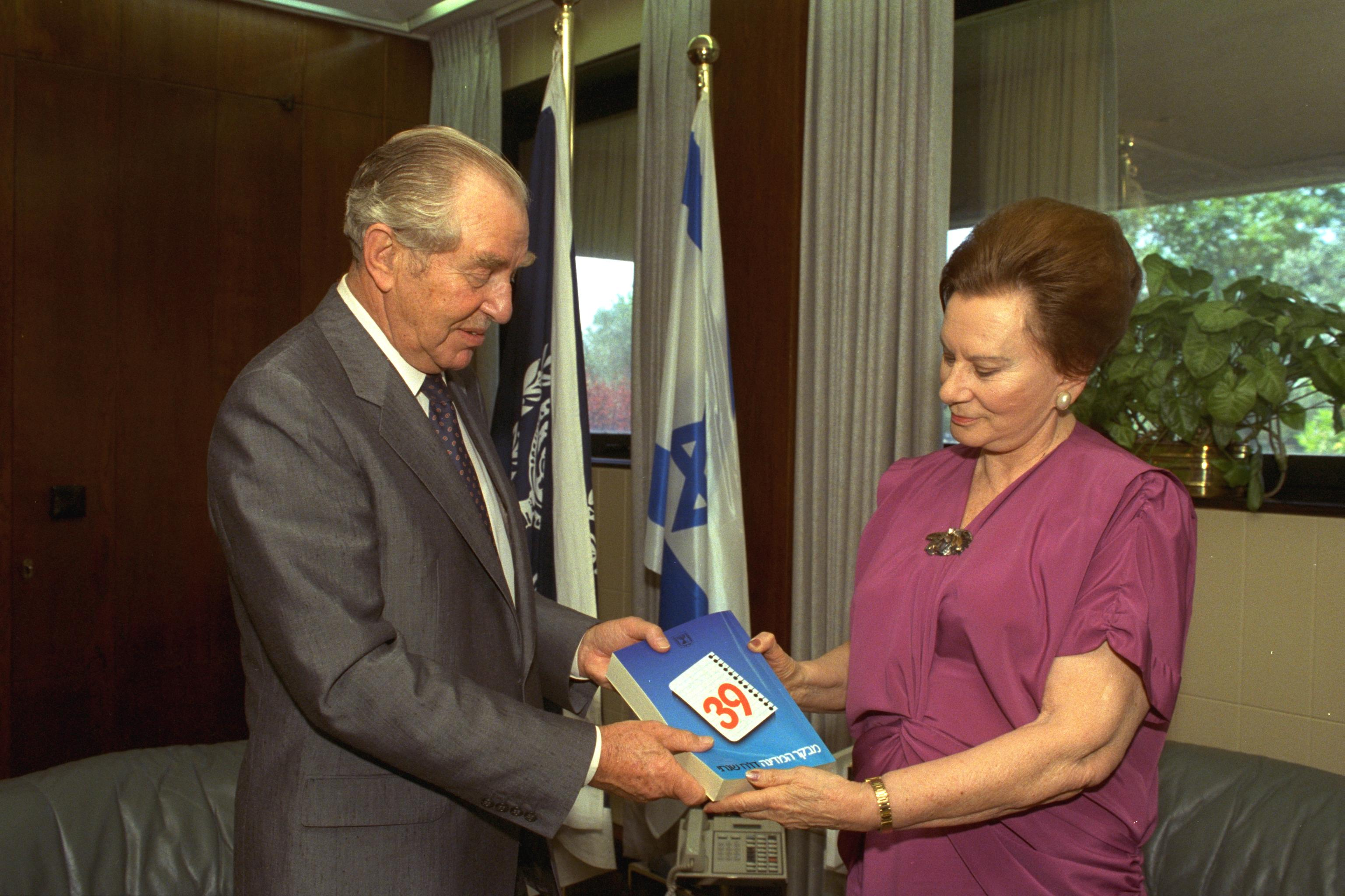 Pres. Chaim Herzog and state comptroller Miriam Ben Porath looking at the cover of 39th state comptroller's report covering the last two years at Beit Hanassi (15/05/1989). מבקרת המדינה מרים בן פורת מציגה בפני נשיא המדינה חיים הרצוג את דוח המבקר מס' 39, בבית הנשיא בירושלים. Photo: ISRAELI TSVIKA.